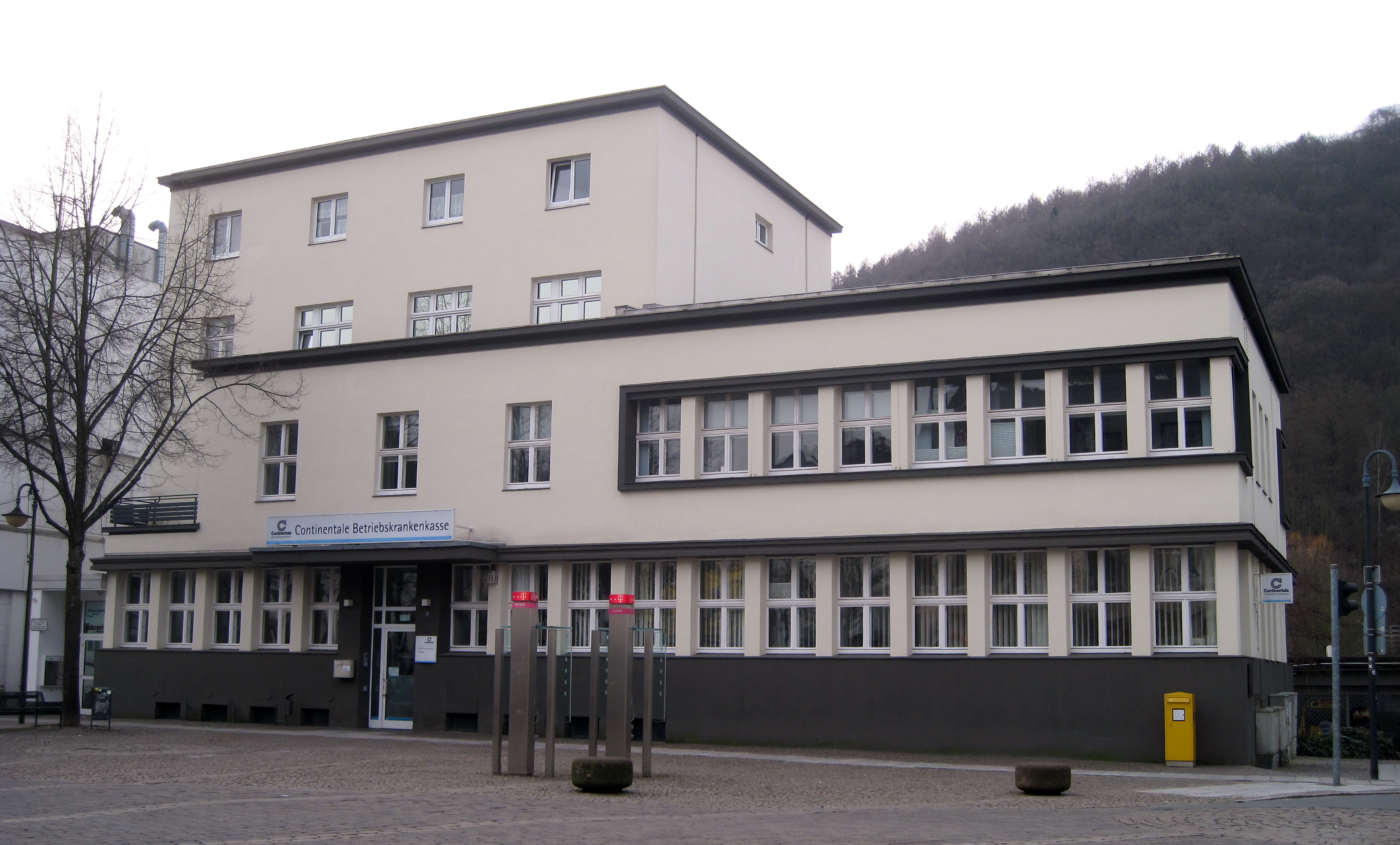 Postamt Maiplatz 3 in Plettenberg. This image shows a heritage building in Germany, located in the North Rhine-Westphalian city Plettenberg (no. 99).